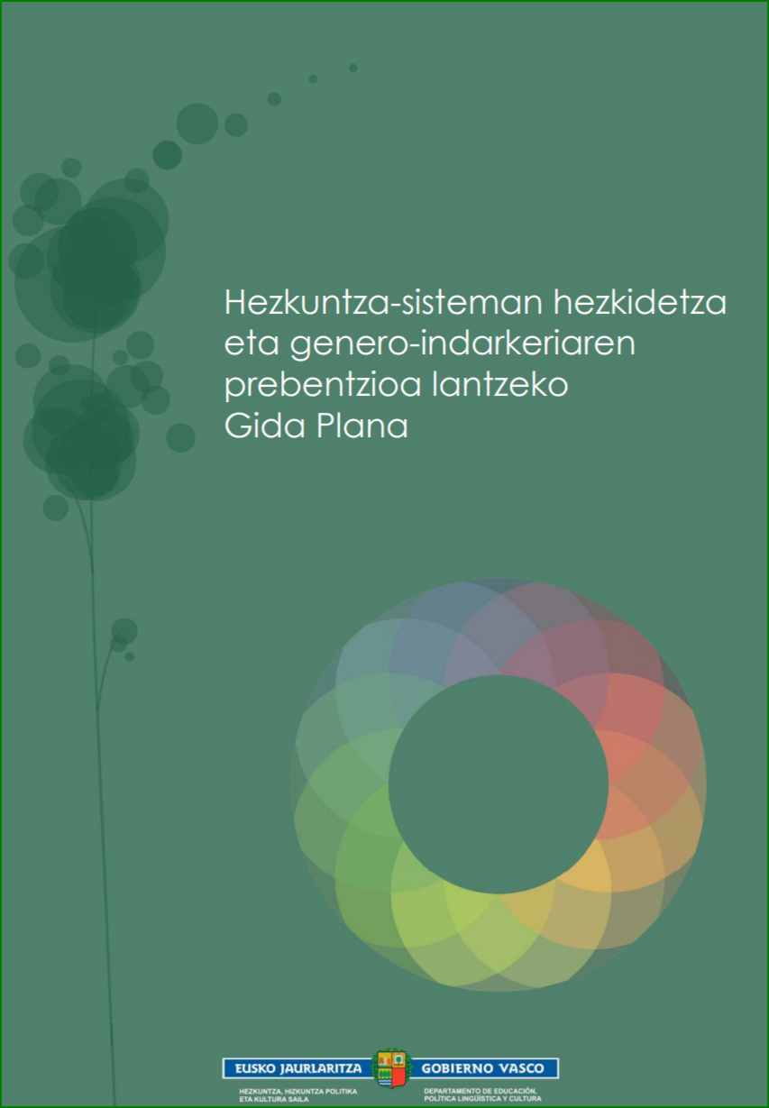 Euskal Autonomia Erkidegoko Administrazioa. Hezkuntza, Hizkuntza Politika eta Kultura Sailak 2013an sustaturiko I. hezkidetza plana